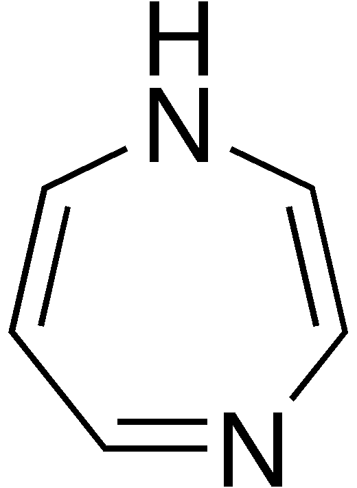 chemical structure of 1,4-diazepine